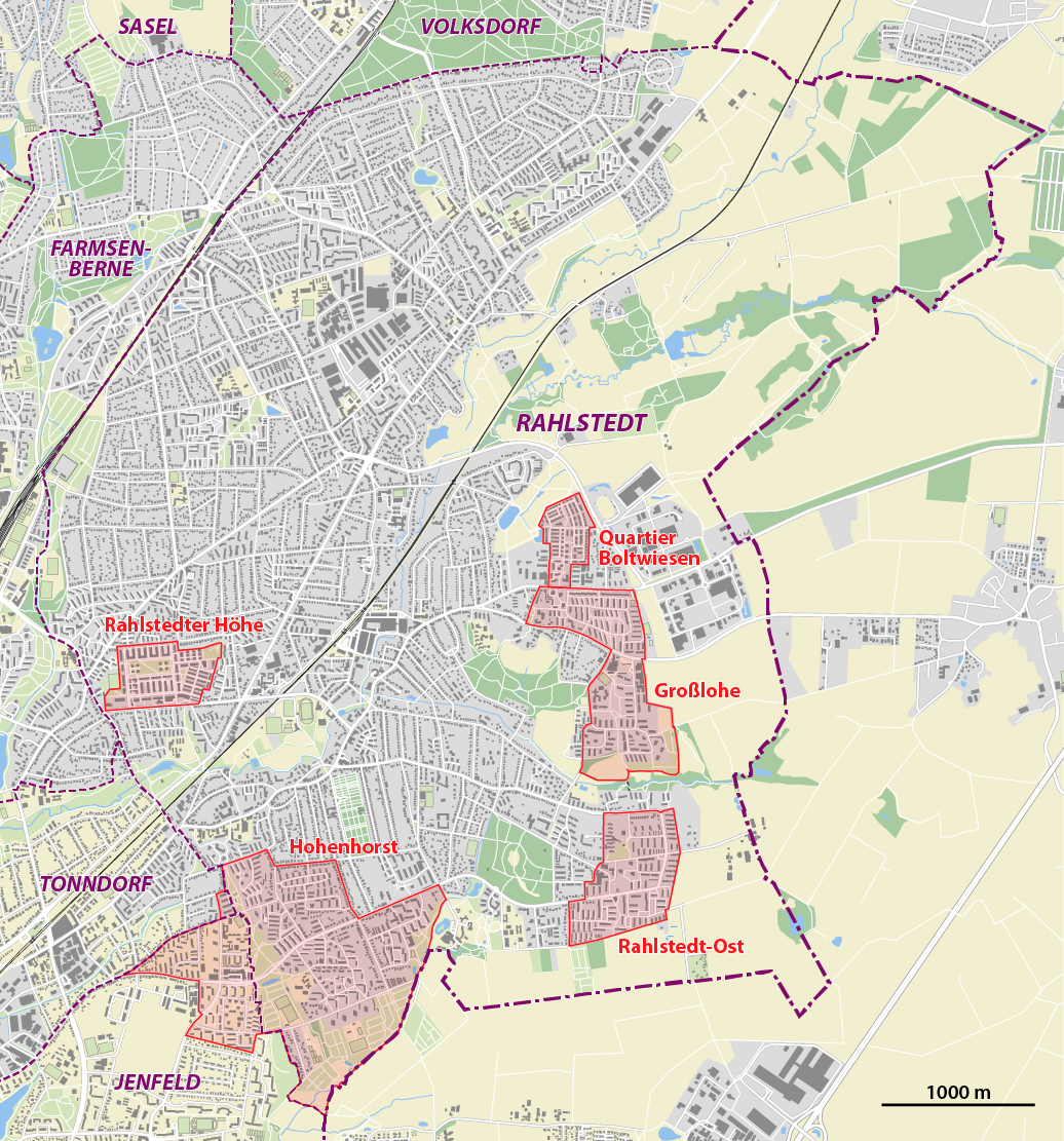 Karte der Großsiedlungen in Hamburg-Rahlstedt